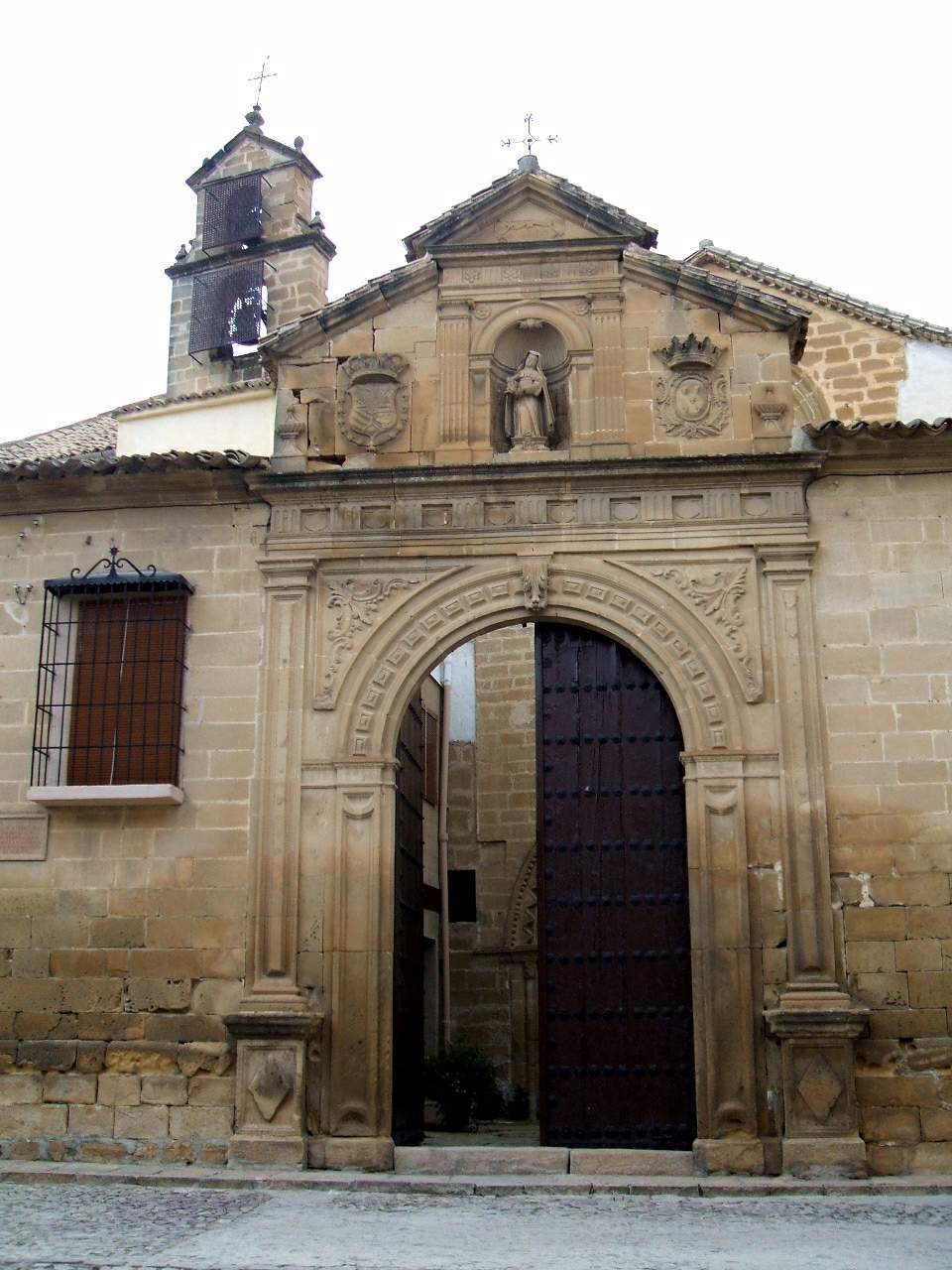 Real Convento de Santa Clara, Úbeda (Jaén)